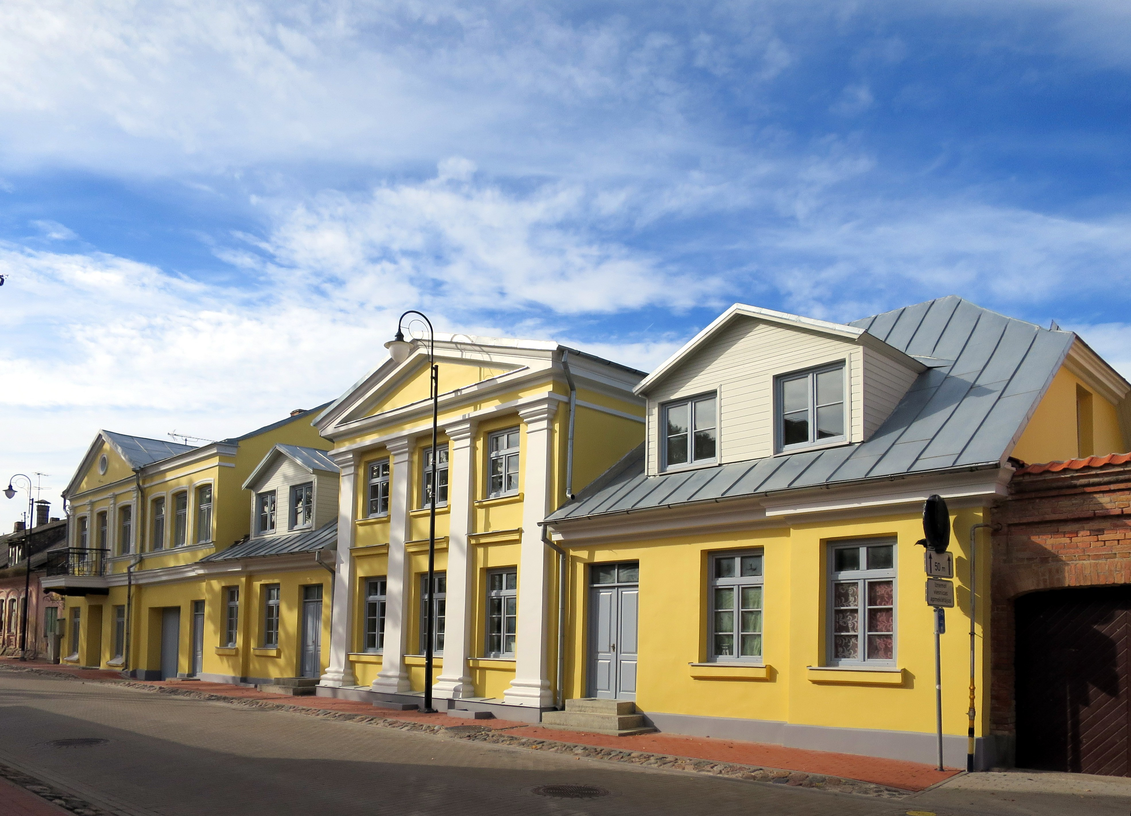 Dzīvojamā un veikalu ēka, Bauska, Rīgas iela 41